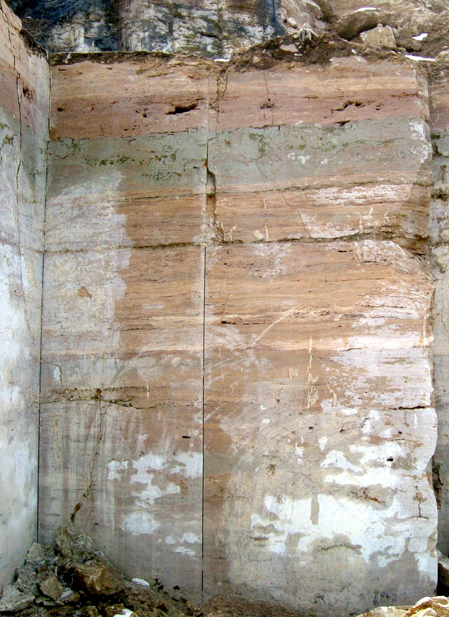 Nationaler Geotop: Travertine des Ilmtales ; Travertin von Ehringsdorf